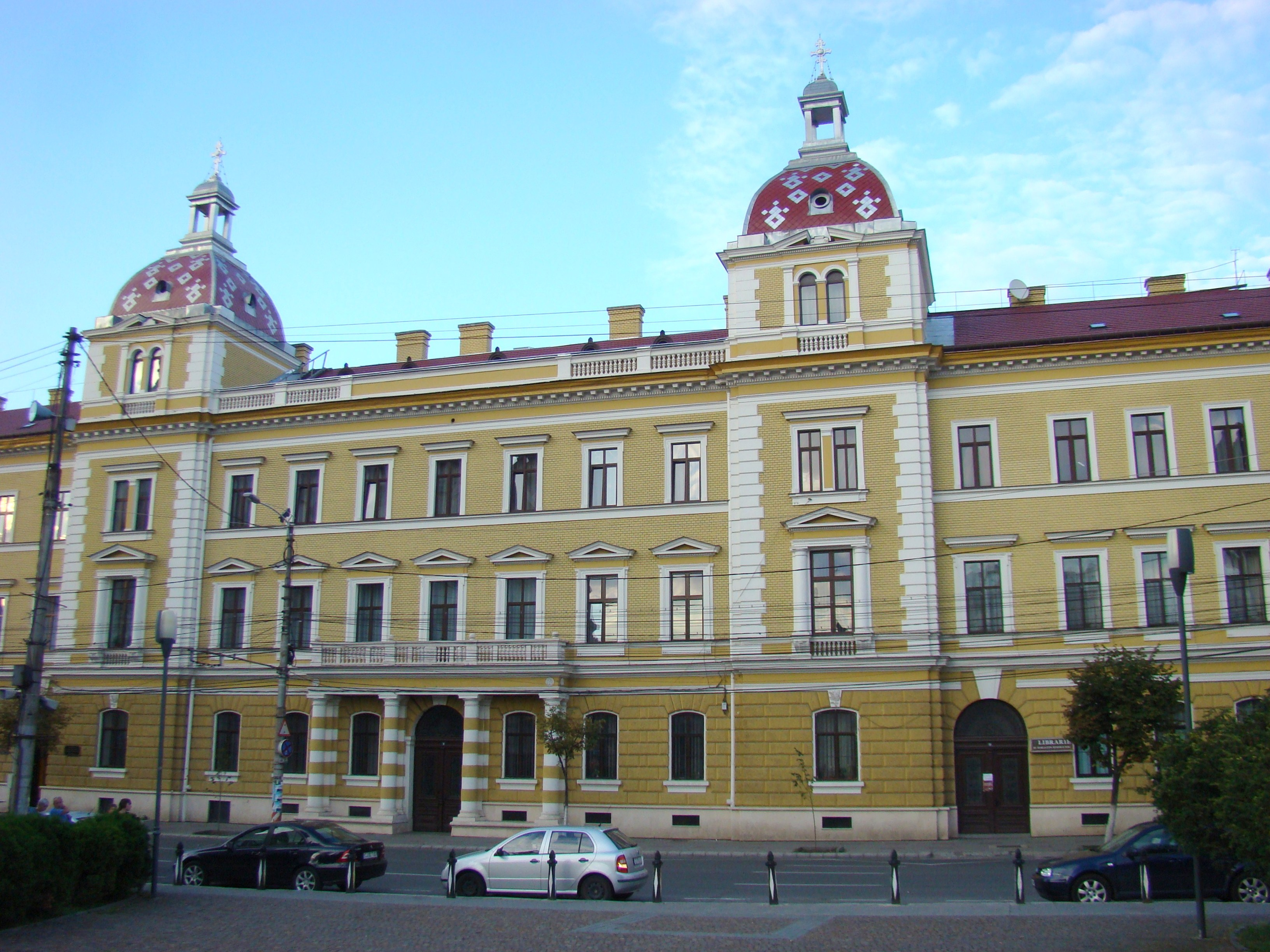 Palatul Arhiepiscopiei Ortodoxe a Clujului (Piata Avram Iancu)